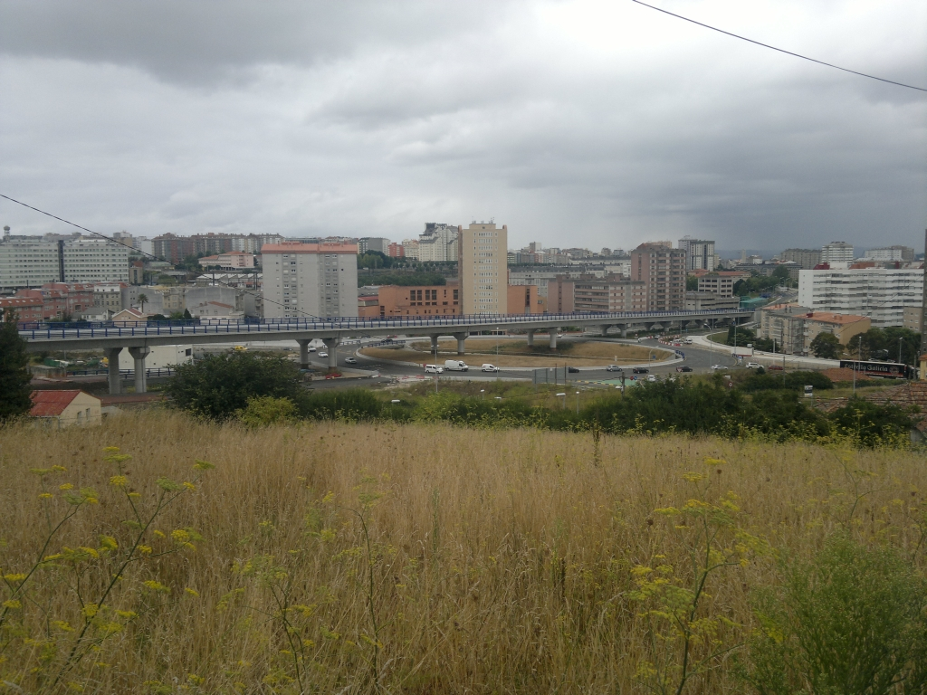 Viaduto das Lonzas.